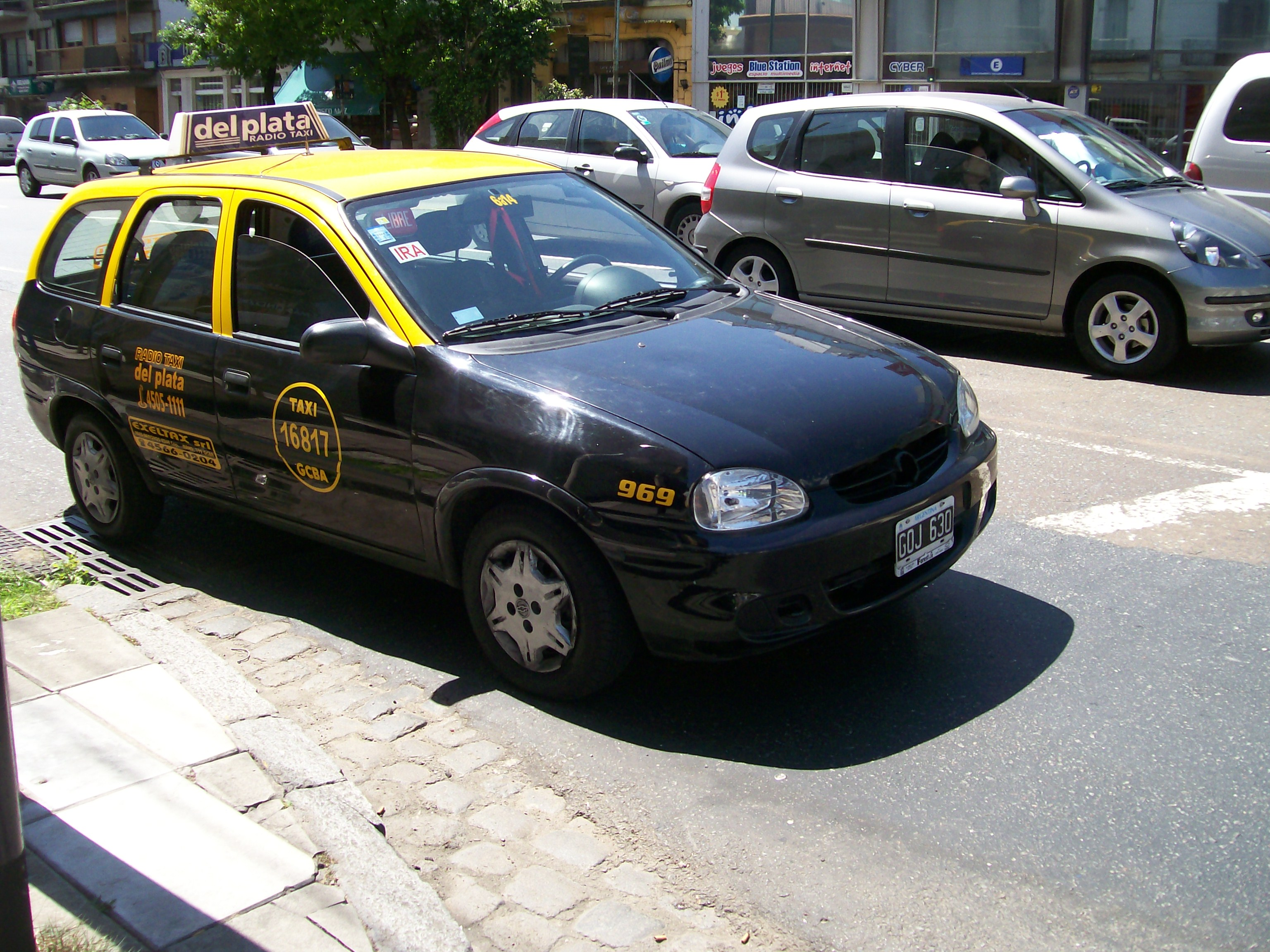 taxi en bsas